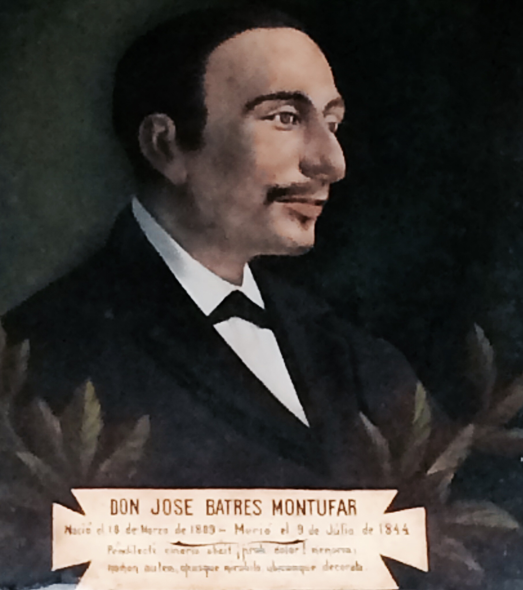 Guatemalan poet José Batres Montúfar.